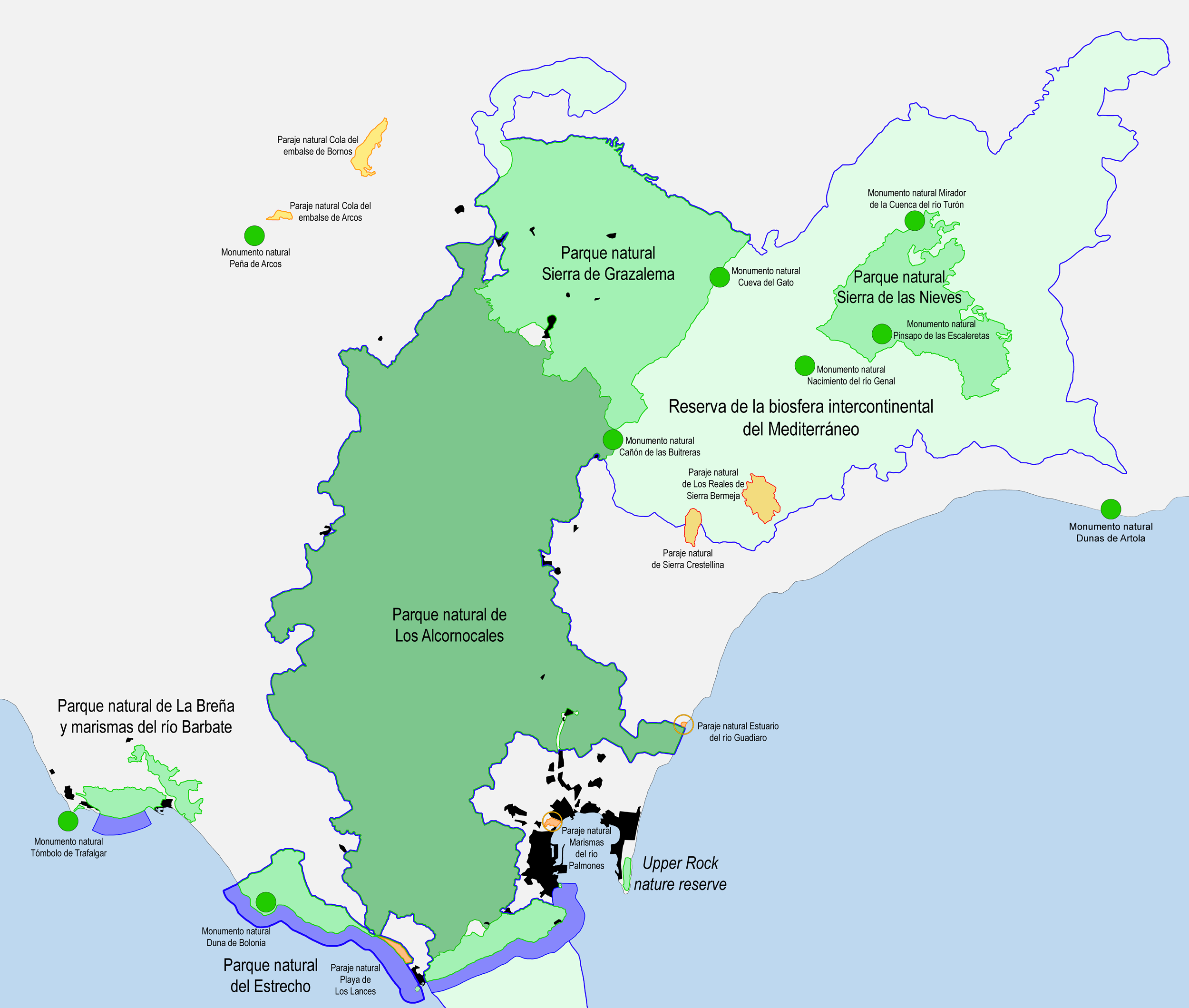 Mapa de las áreas protegidas en el entorno del parque natural de los Alcornocales tras su ampliación en 2017.